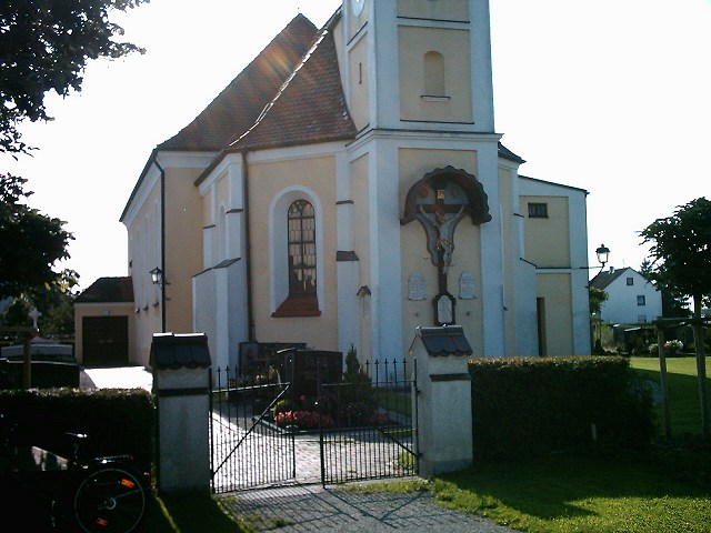 Kirche in Anwalting (Gemeinde Affing), Bayern, Deutschland / Ost-Ansicht